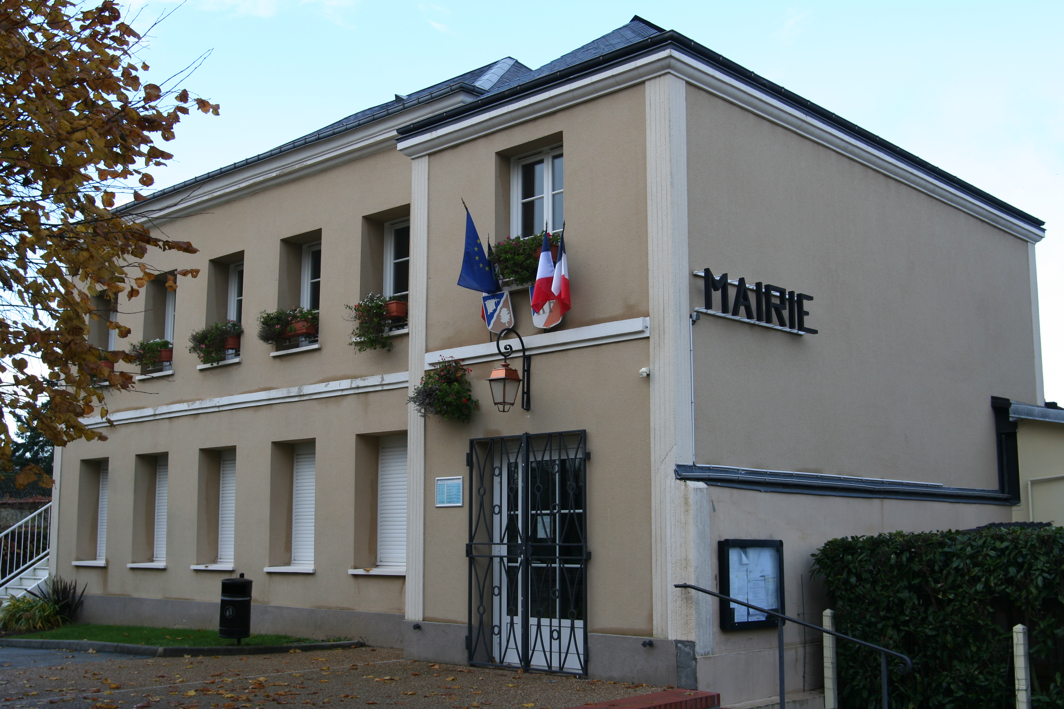 Mairie de Saint-Martin-du-Manoir.